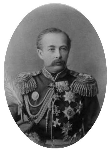 Казнаков, Николай Геннадьевич (1823—1885) — генерал от инфантерии, генерал-адъютант.